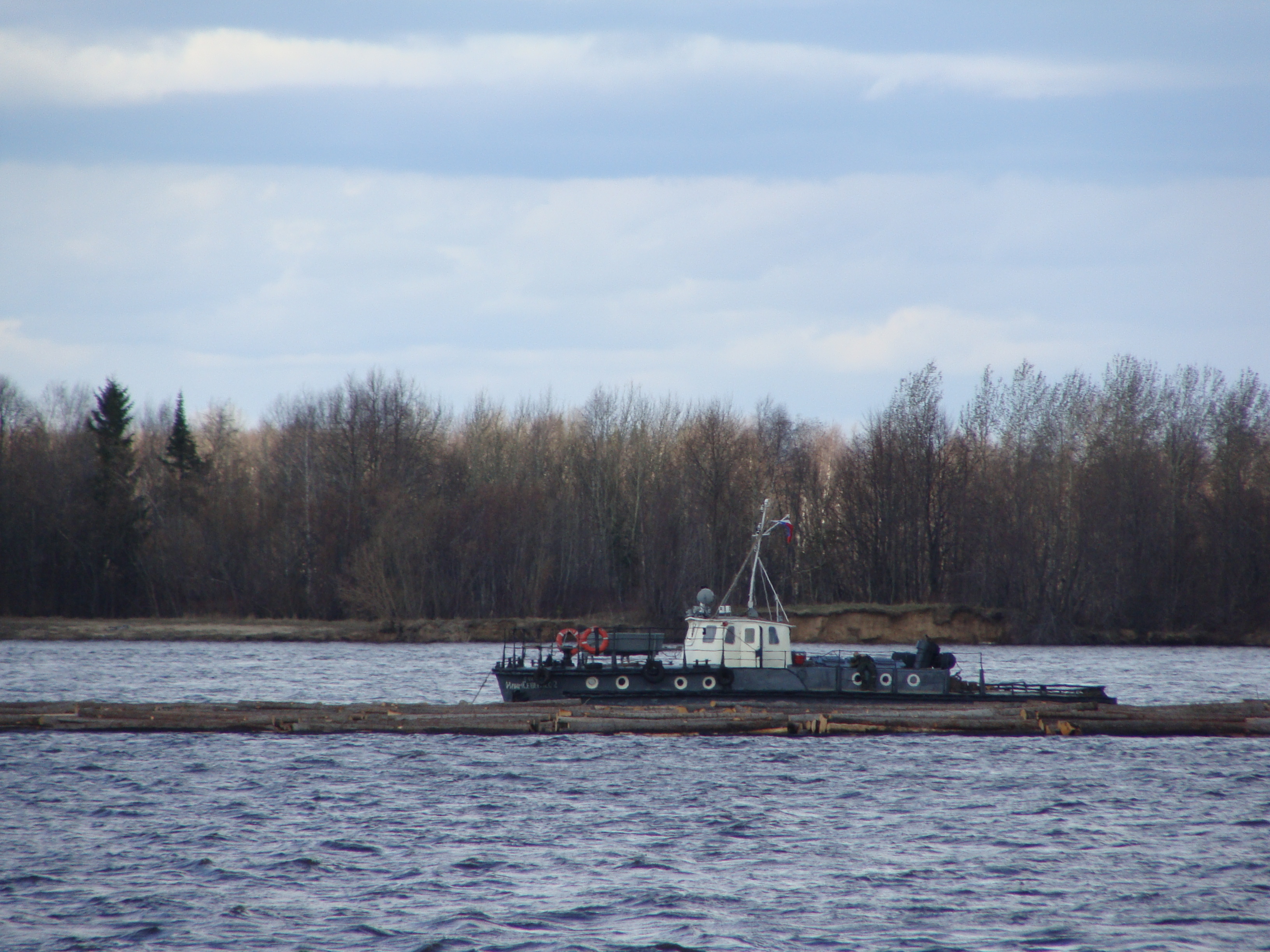 Сплав леса в половодье, Вычегда. У г. Коряжма.